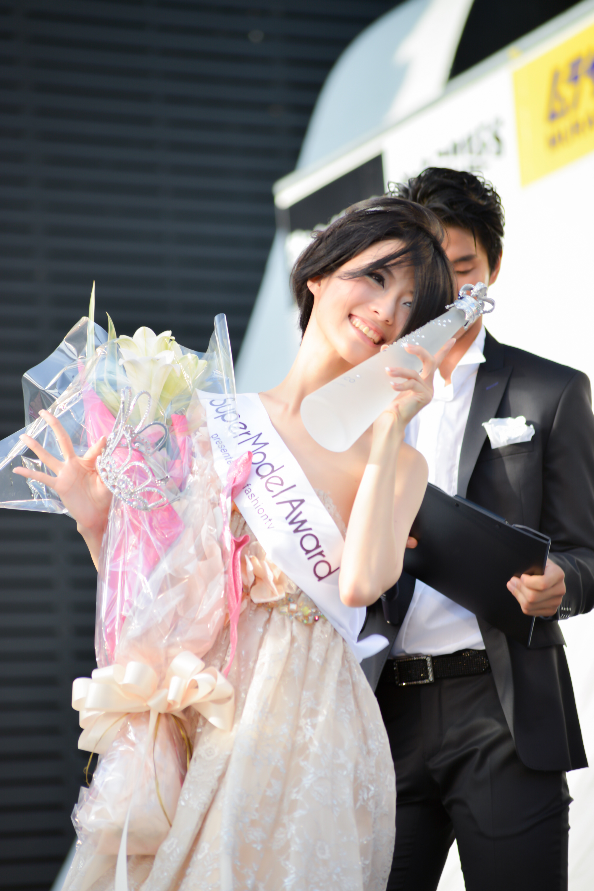 スーパーモデルアワード世界グランプリYumikoさん。a-nationにて開催。